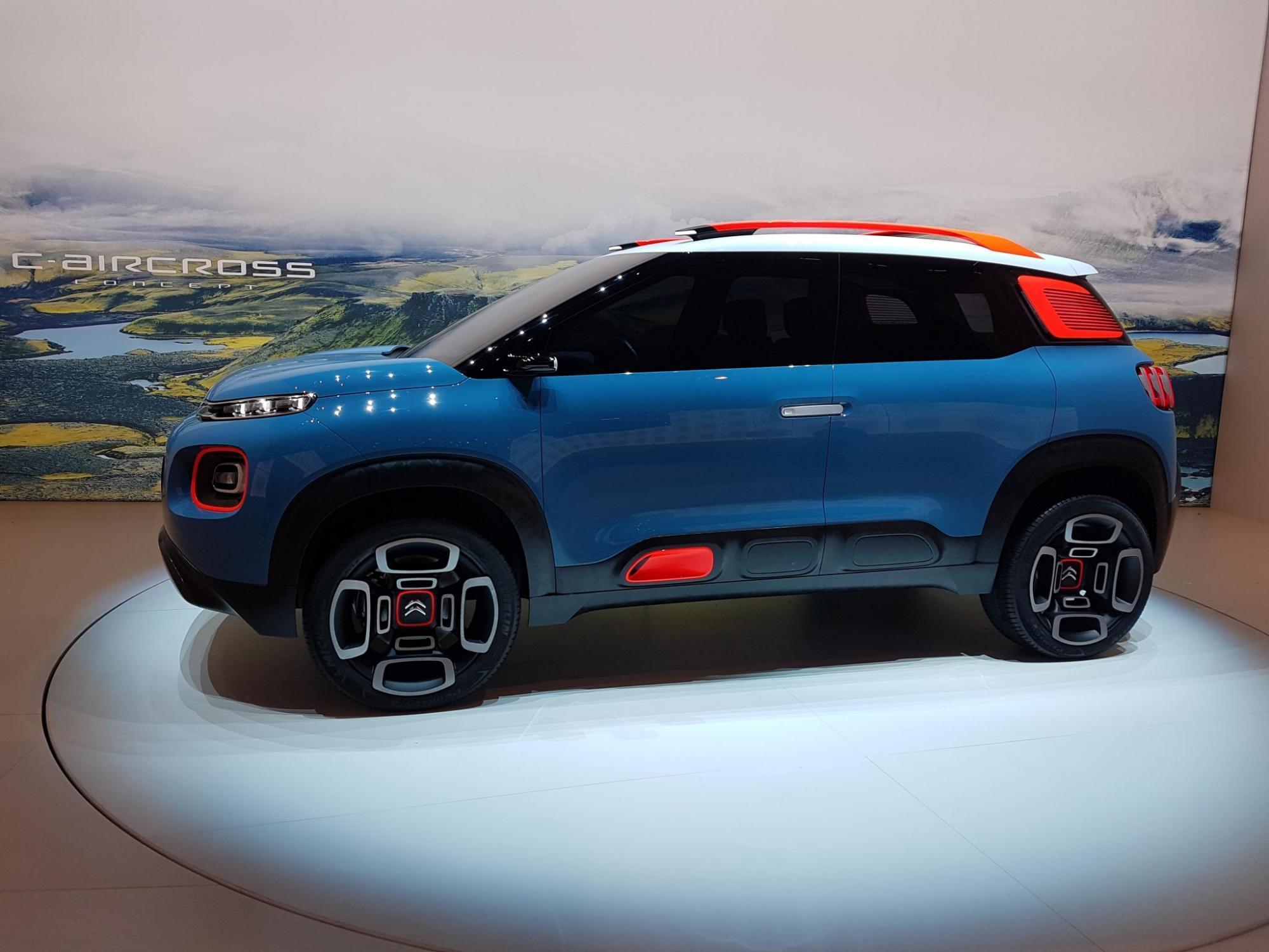 Citroen C Aicross concept - Salon de Genève mars 2017